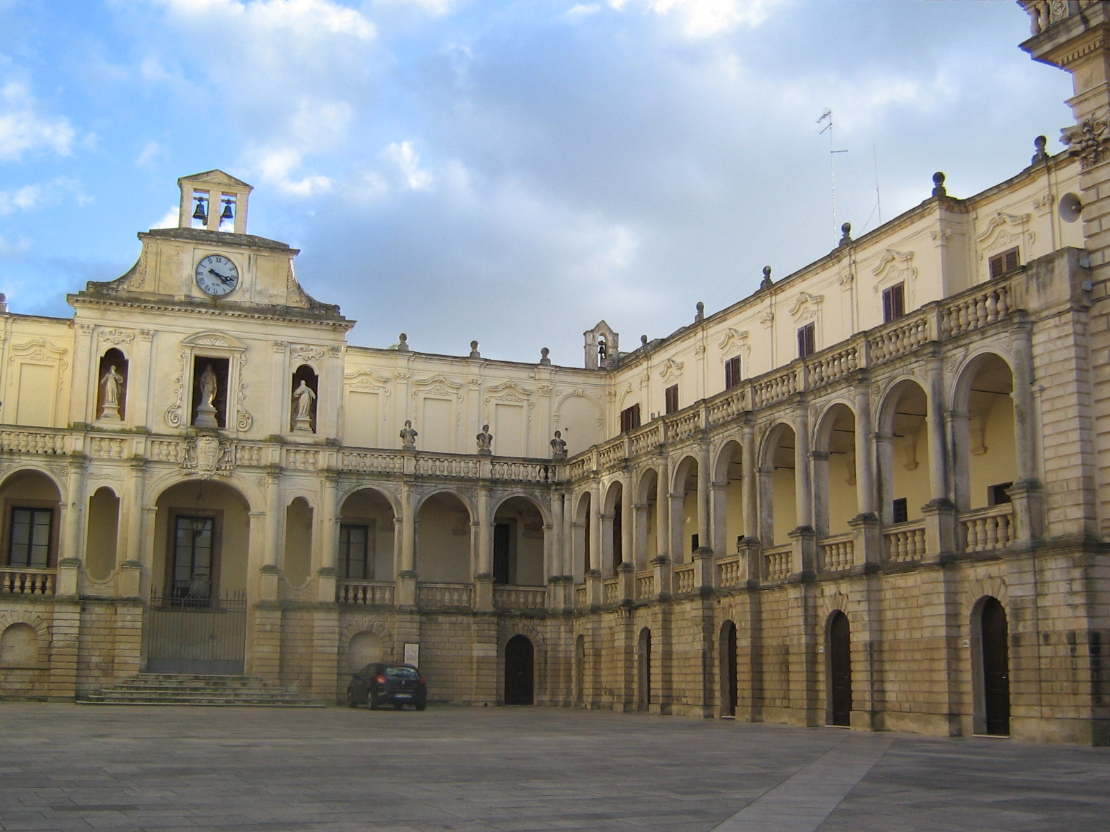 Episcopio, Lecce